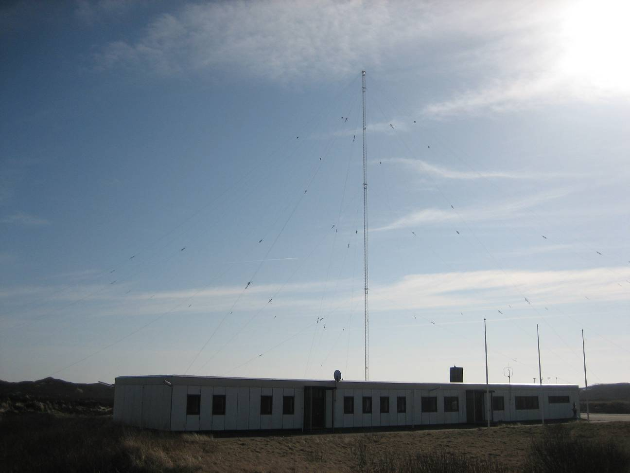 Sendemast bei Rantum, Sylt, Germany